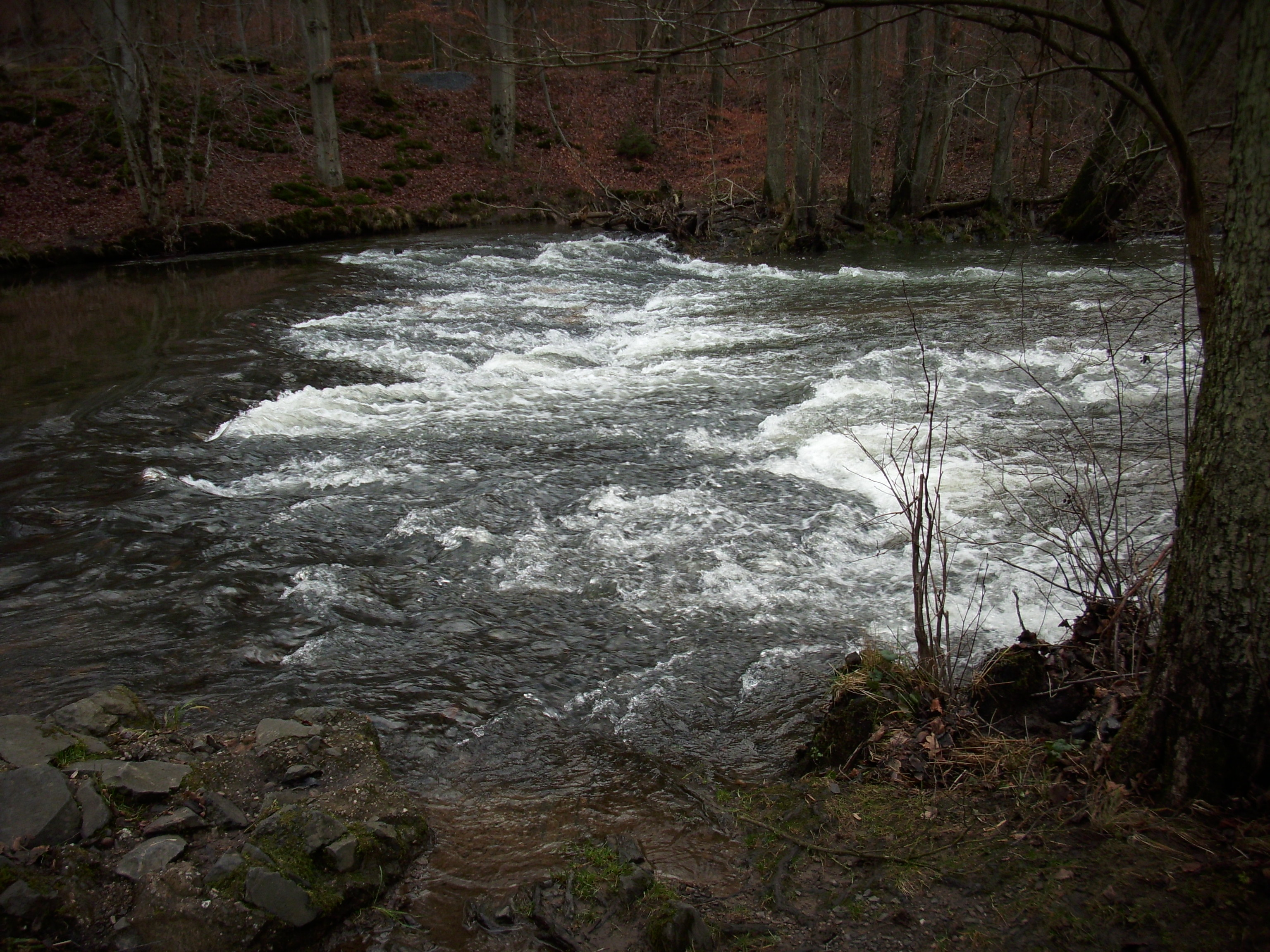 Die Nister an einem Wehr, bei der Abtei Marienstatt